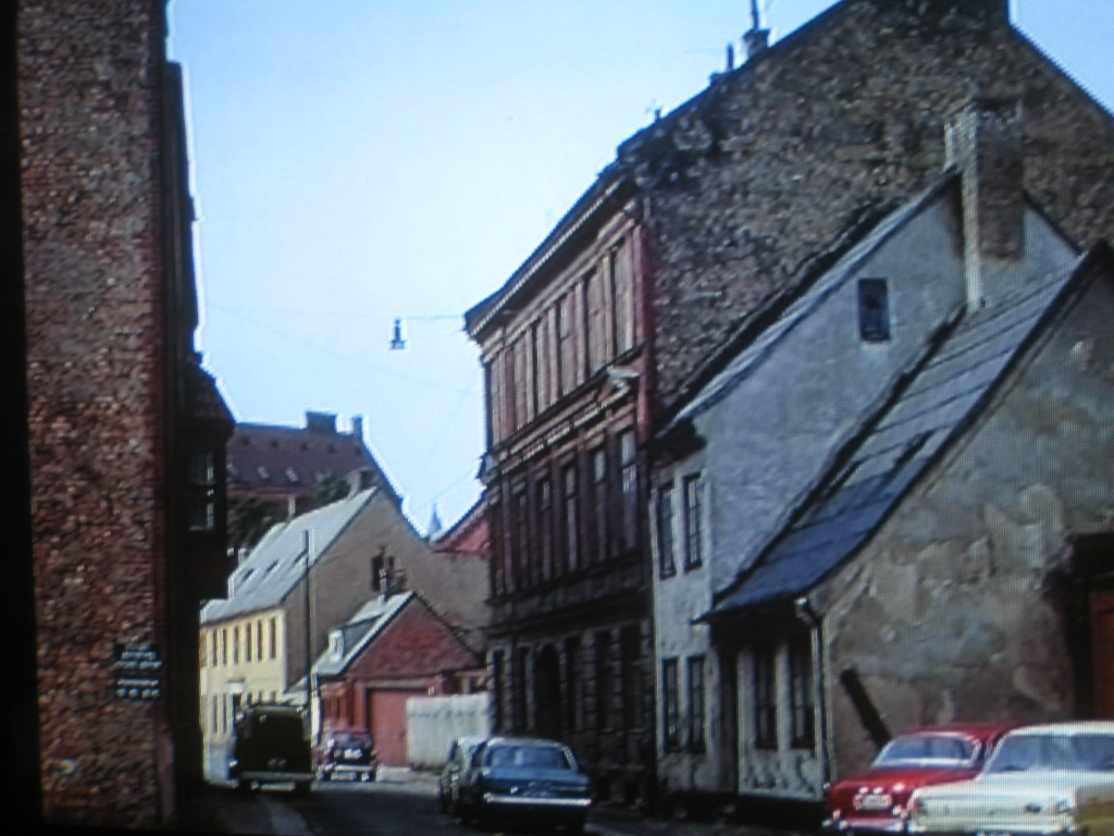 Oldest part of Grönegatan in Malmö, 1968.